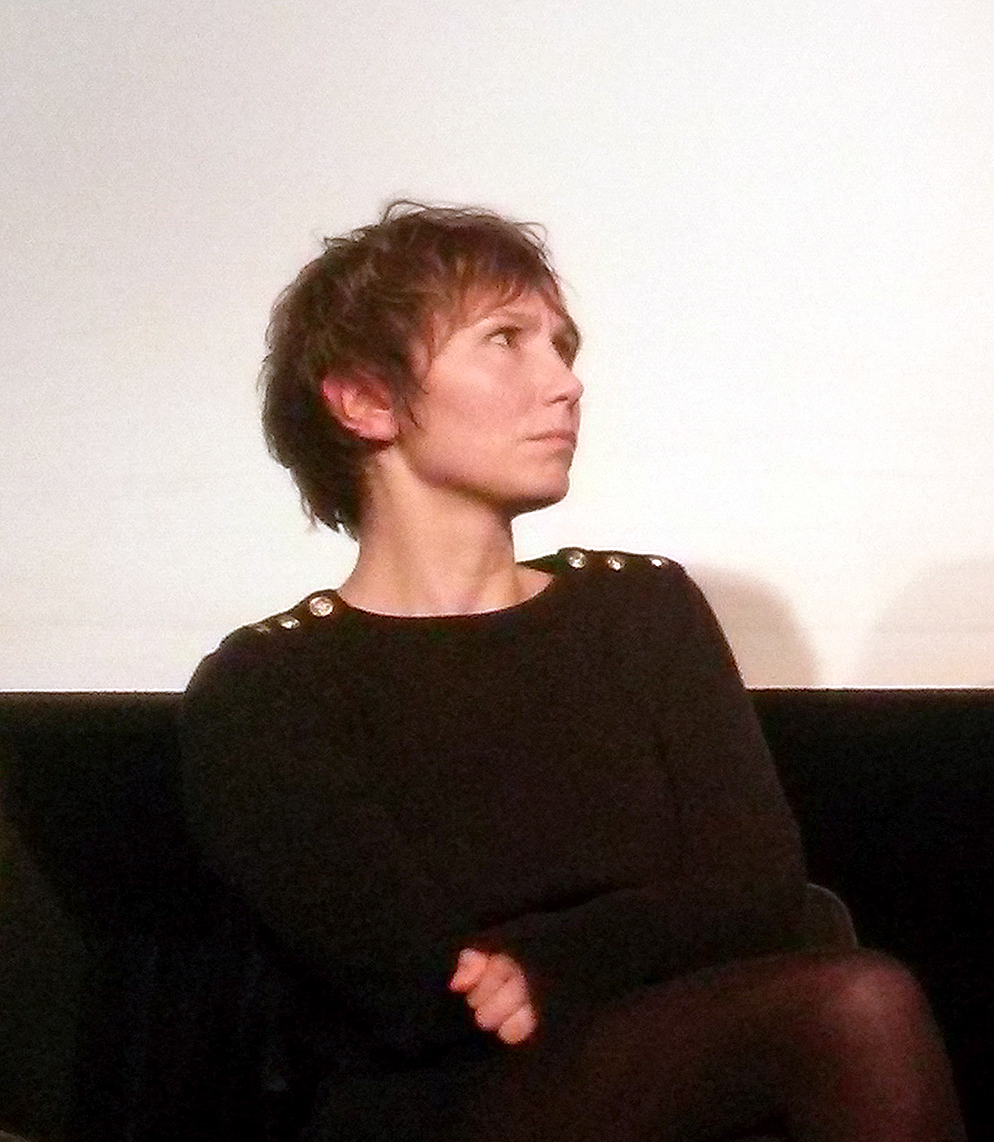 Динара Друкарова